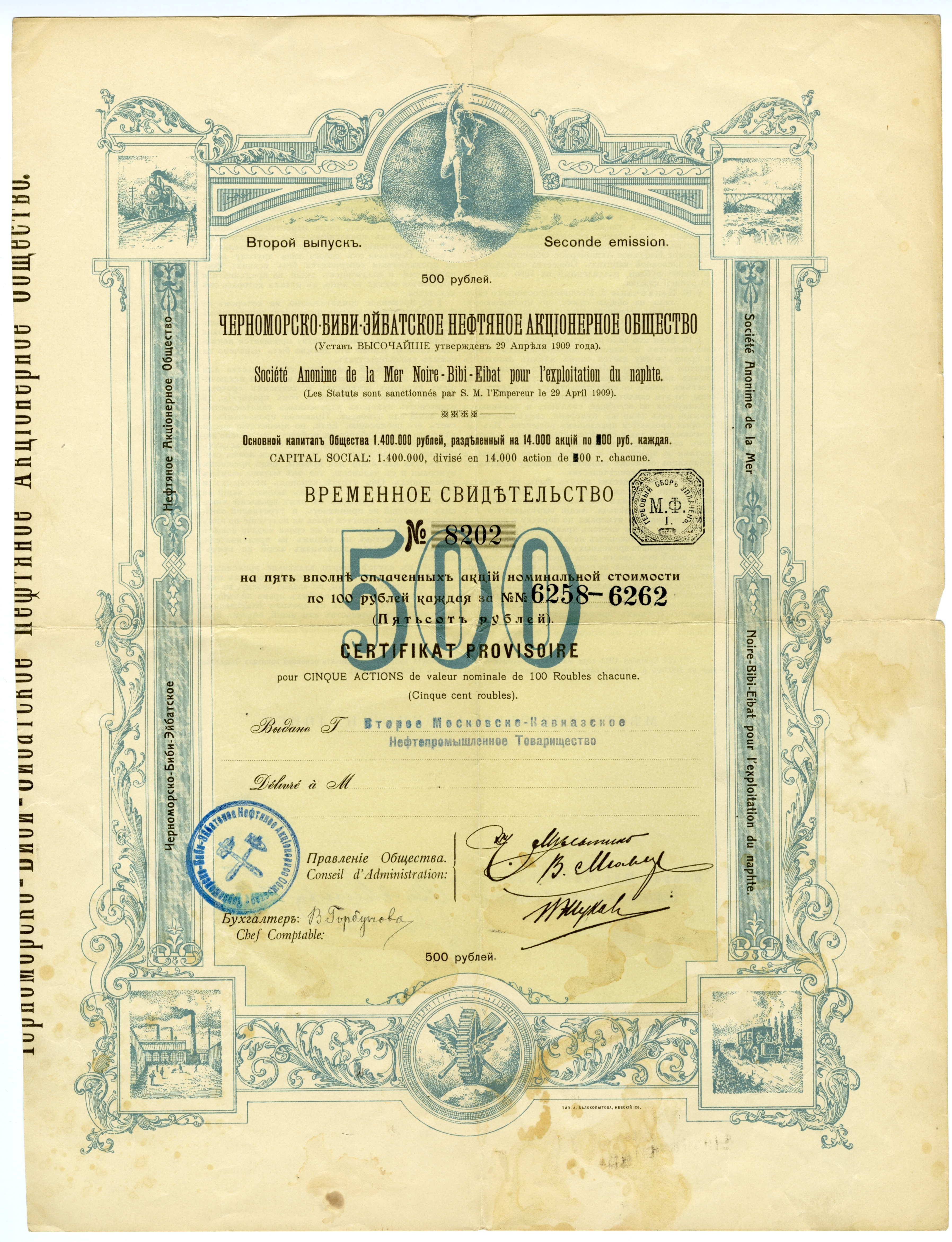 Именное временное свидетельство на пять акций (в сто рублей каждая) номиналом в пятьсот рублей Черноморско-Биби-Эйбатского нефтяного акционерного общества.